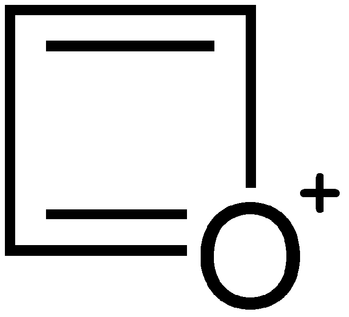 Struktur von Oxetium